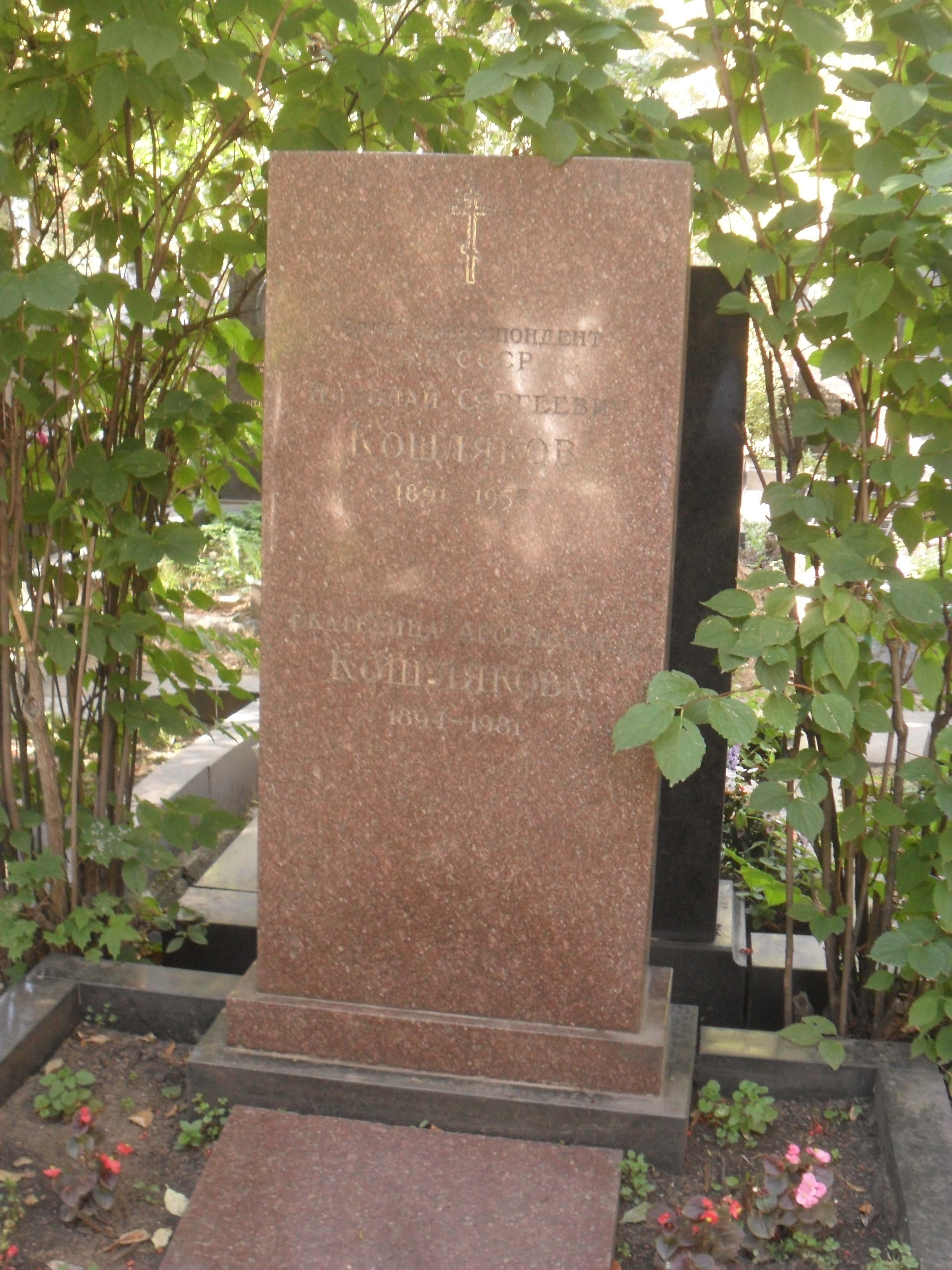 Могила академика Николая Кошлякова на Новодевичьем кладбище Москвы.